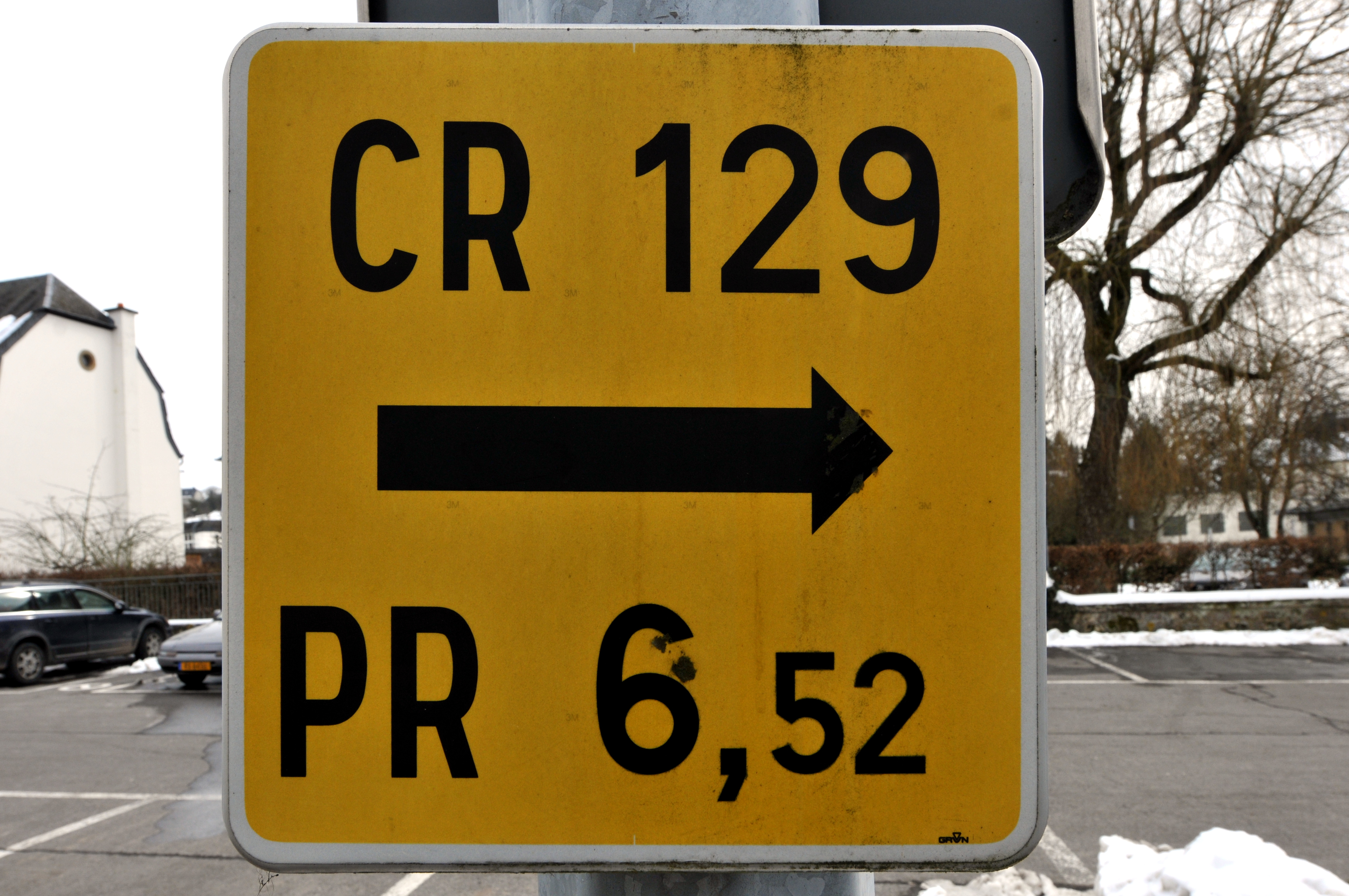 Schëld CR 129 an der rue du Village zu Jonglënster.